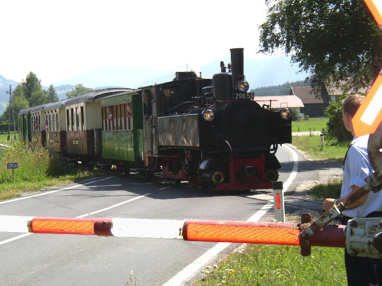 Beim Bahnhof Mariapfarr kreuzt die Taurachbahn die Bundesstraße